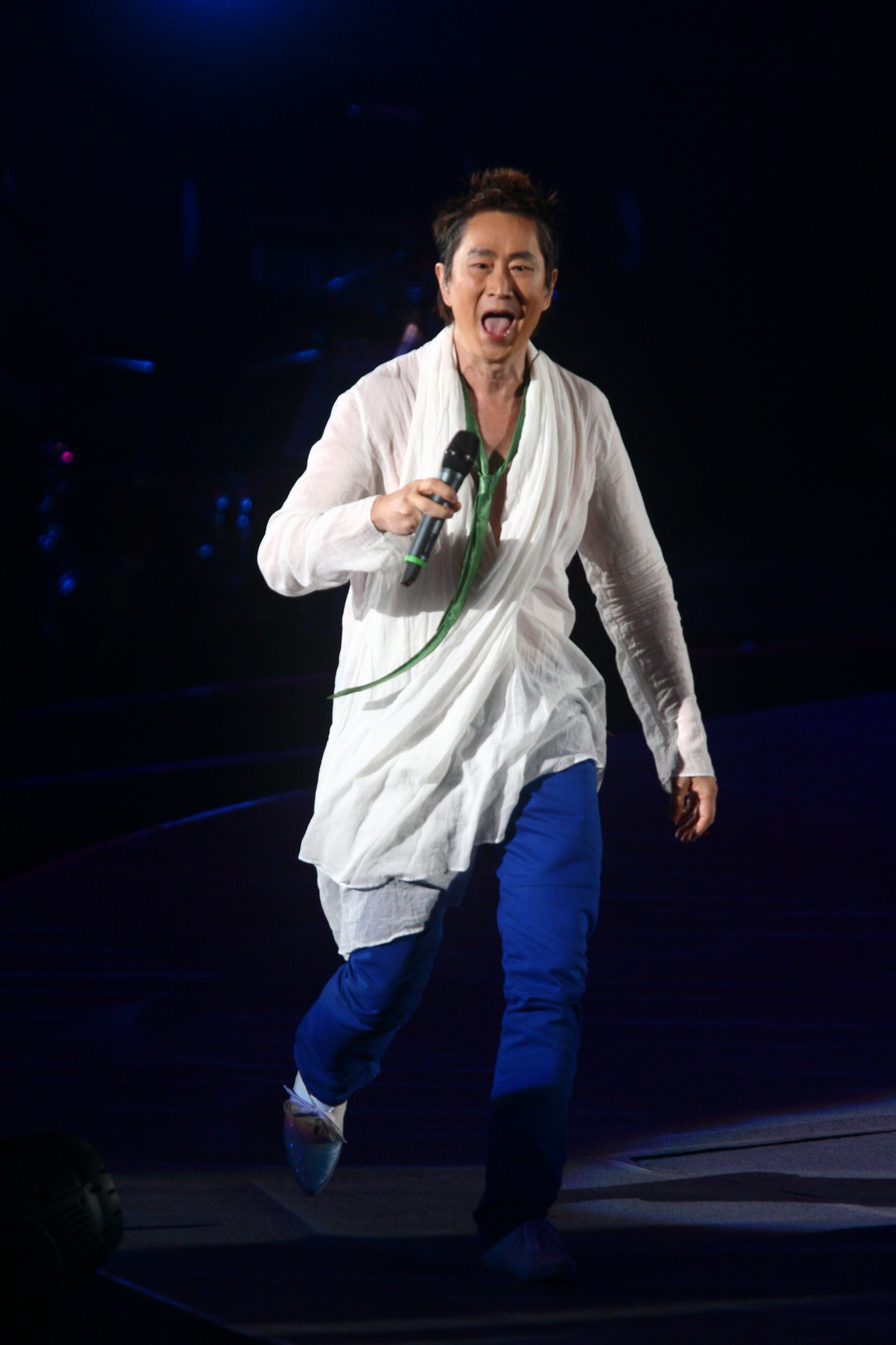 李恕權出席滾石唱片30周年演唱會。